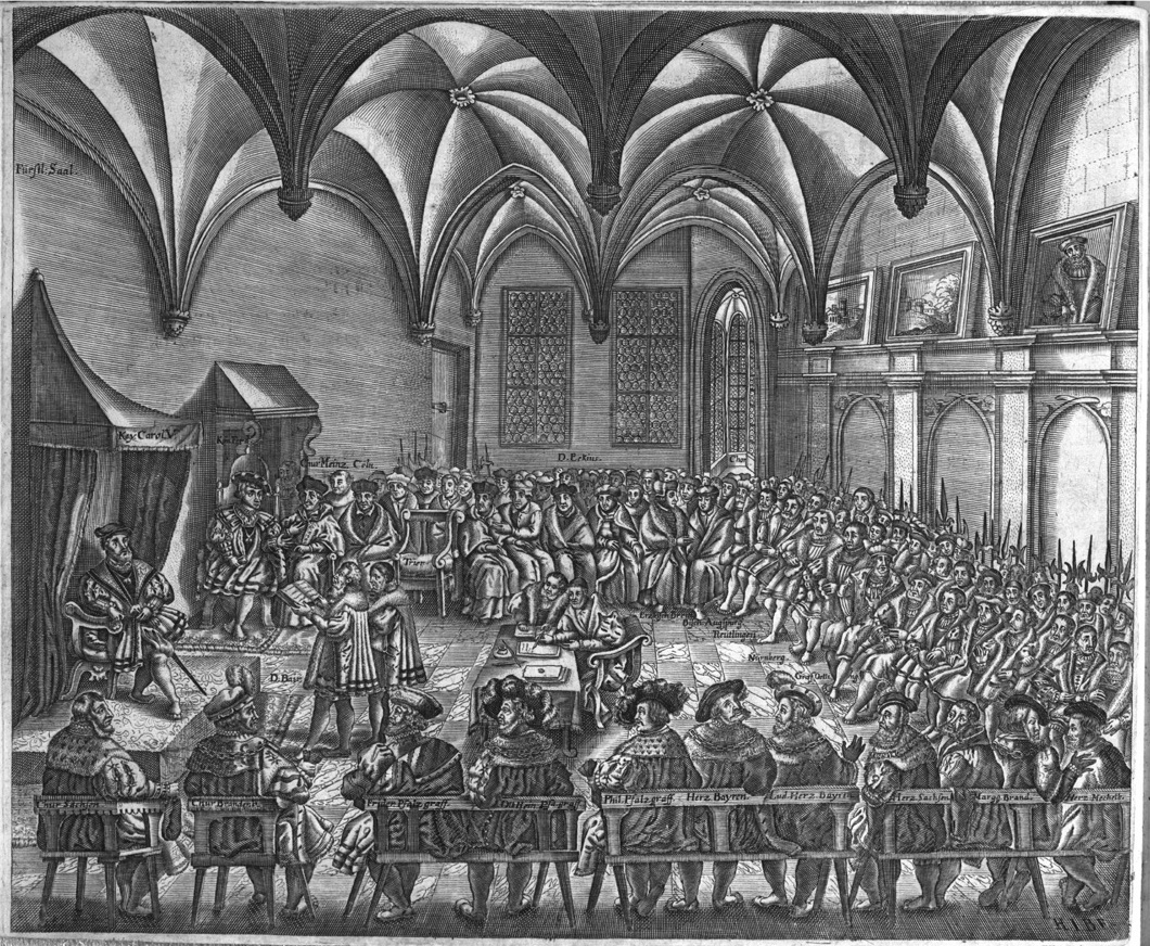 Diet of Augsburg by Christian Beyer Augsburger Reichstag gemeinfrei Holzschnitt aus dem 16.Jahrhundert in Nürnberg: Kanzler Dr.Christian Beyer verliest vor Karl V die "Confessio Augustana" von Phillipp Melanchton